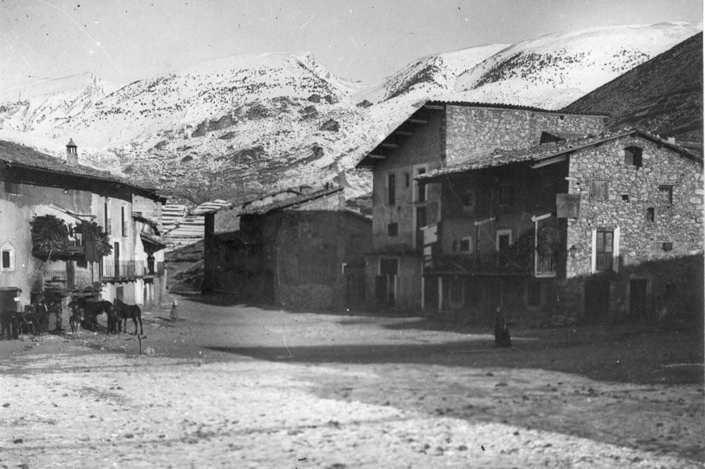 Plaça major de Gòsol amb gent i bèsties de càrrega. Cèsar August Torras i Ferreri (Entre 1890 i 1923)